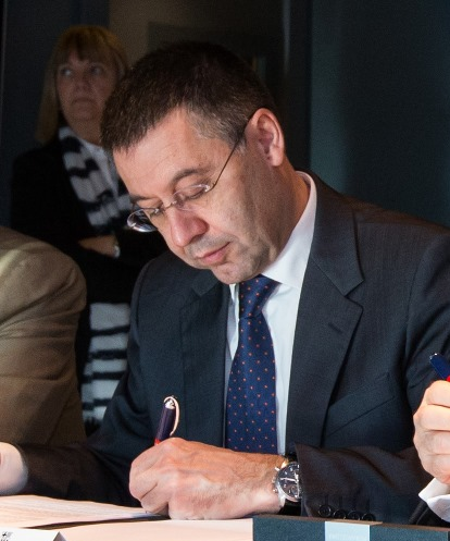 La Cambra de Comerç de Barcelona, ha signat un conveni de col·laboració amb el FC Barcelona per col·laborar en la promoció internacional del teixit econòmic i empresarial de Barcelona i Catalunya. Nota de premsa